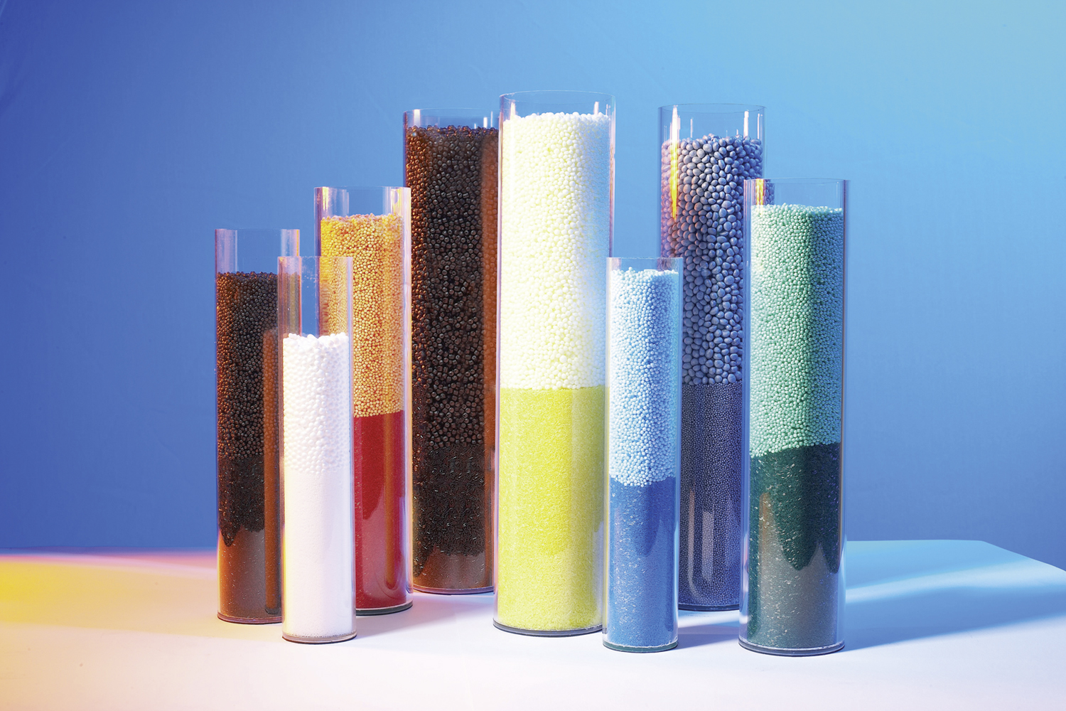 Granulat